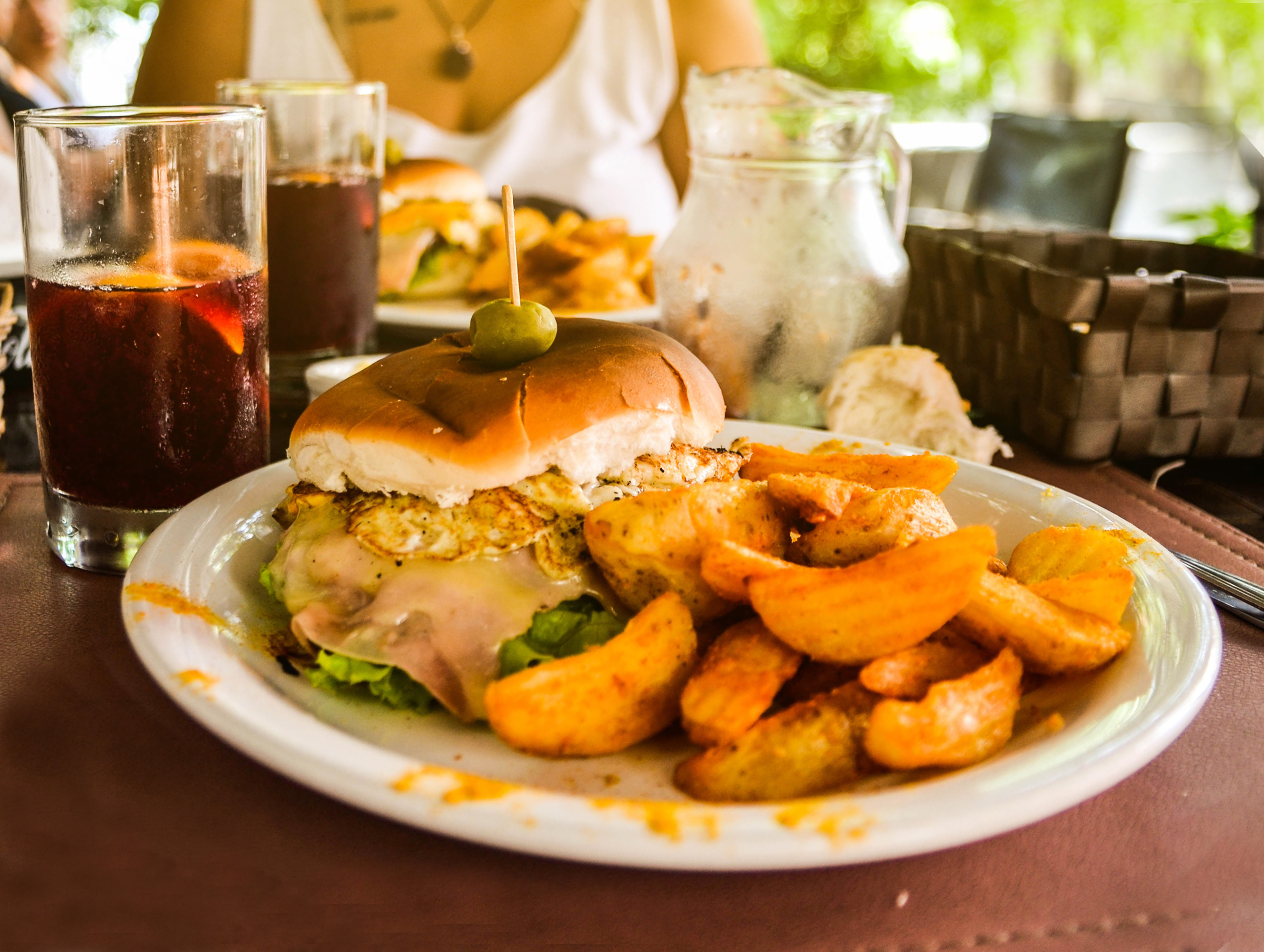 El chivito es un plato típico uruguayo. Es un sándwich de carne vacuna (generalmente de lomo a la plancha), a la que se agregan jamón cocido, panceta (tocino), queso muzzarella (mozzarella), lechuga, tomate, rodajas de huevo duro y morrón (pimiento) y mayonesa. Es común que se lo acompañe con una porción de papas fritas, ensalada rusa u otras guarniciones. Hay diversas variedades de chivito; la más común es el llamado chivito canadiense. También se ofrece el llamado chivito al plato, similar al chivito canadiense pero abierto.